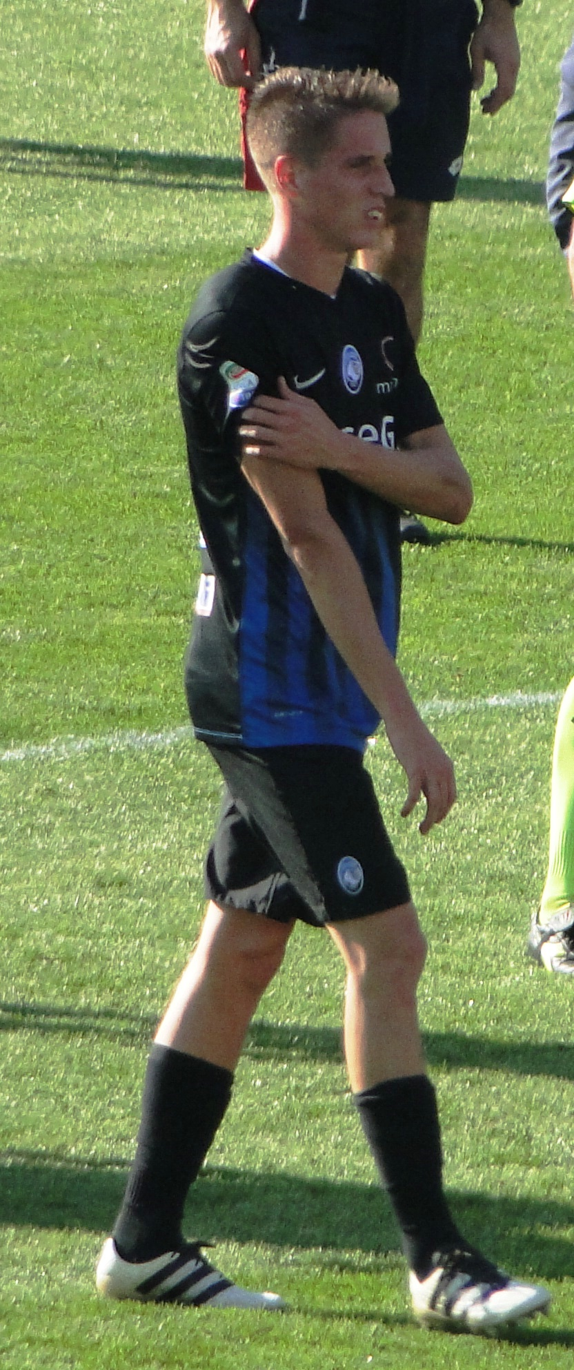 Andrea Conti, calciatore italiano